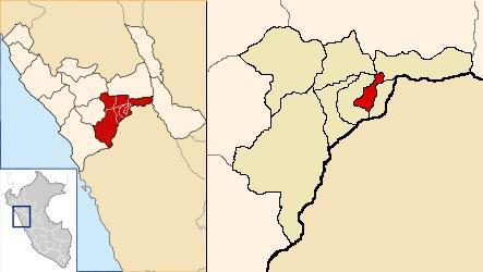 mapa de ubicación del distrito de Mollebamba en santiago de chuco la libertad Perú